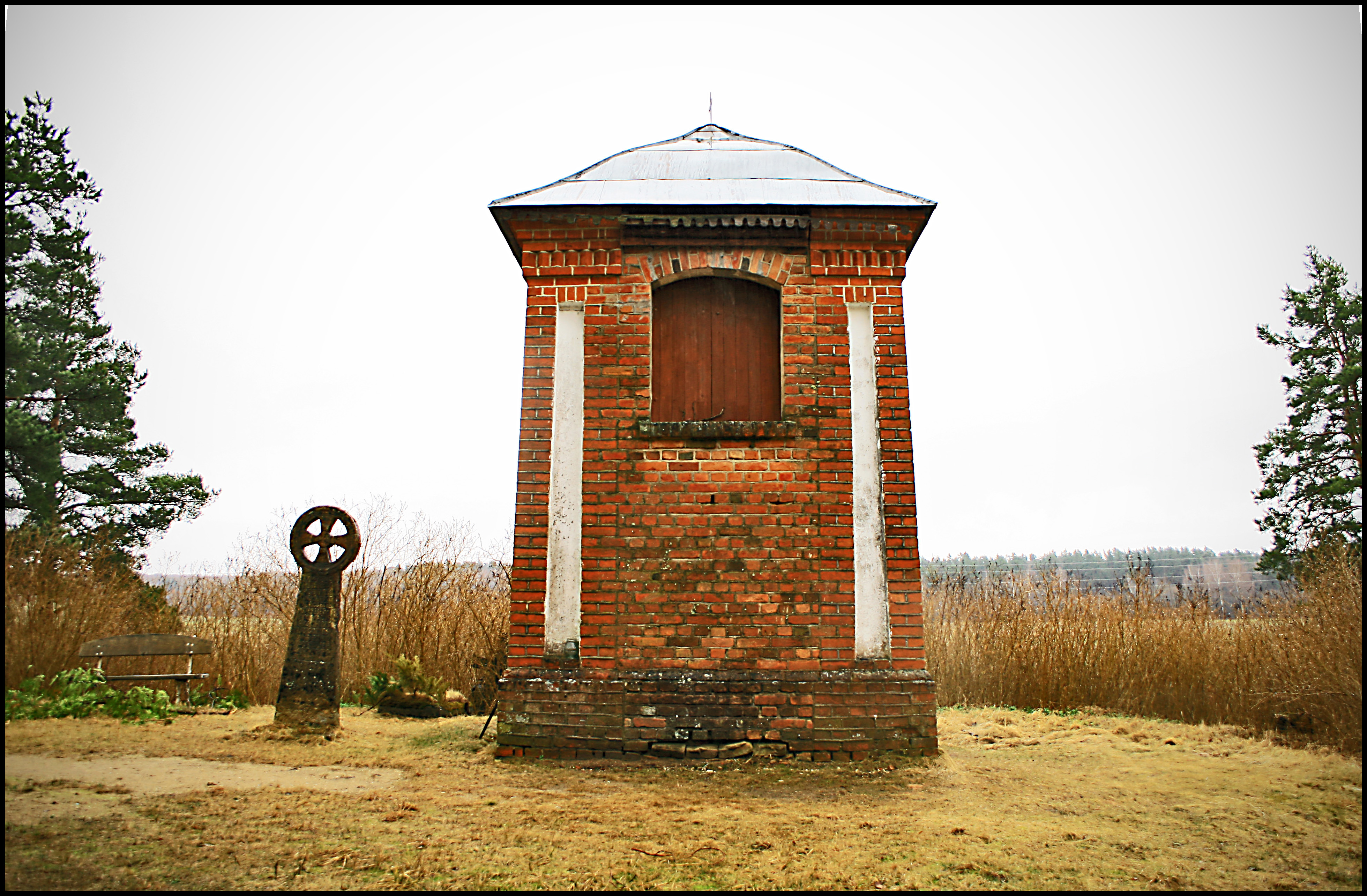 Jēkabnieku riņķa krusts/the circumference tomb cross in Jēkabnieki cemetery